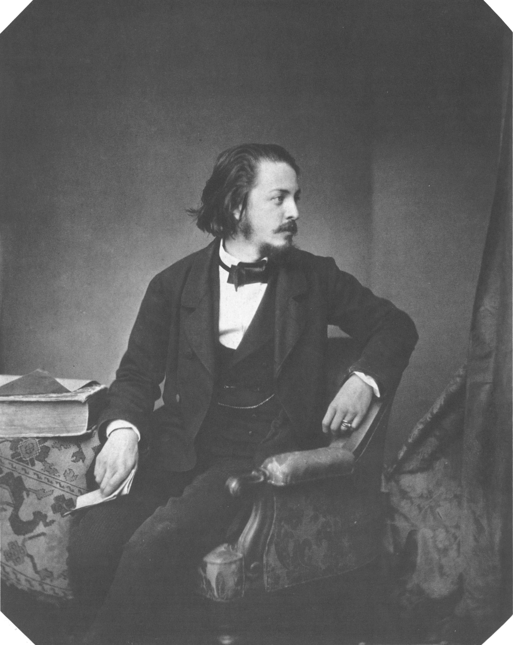 Paul Heyse (1830-1914)